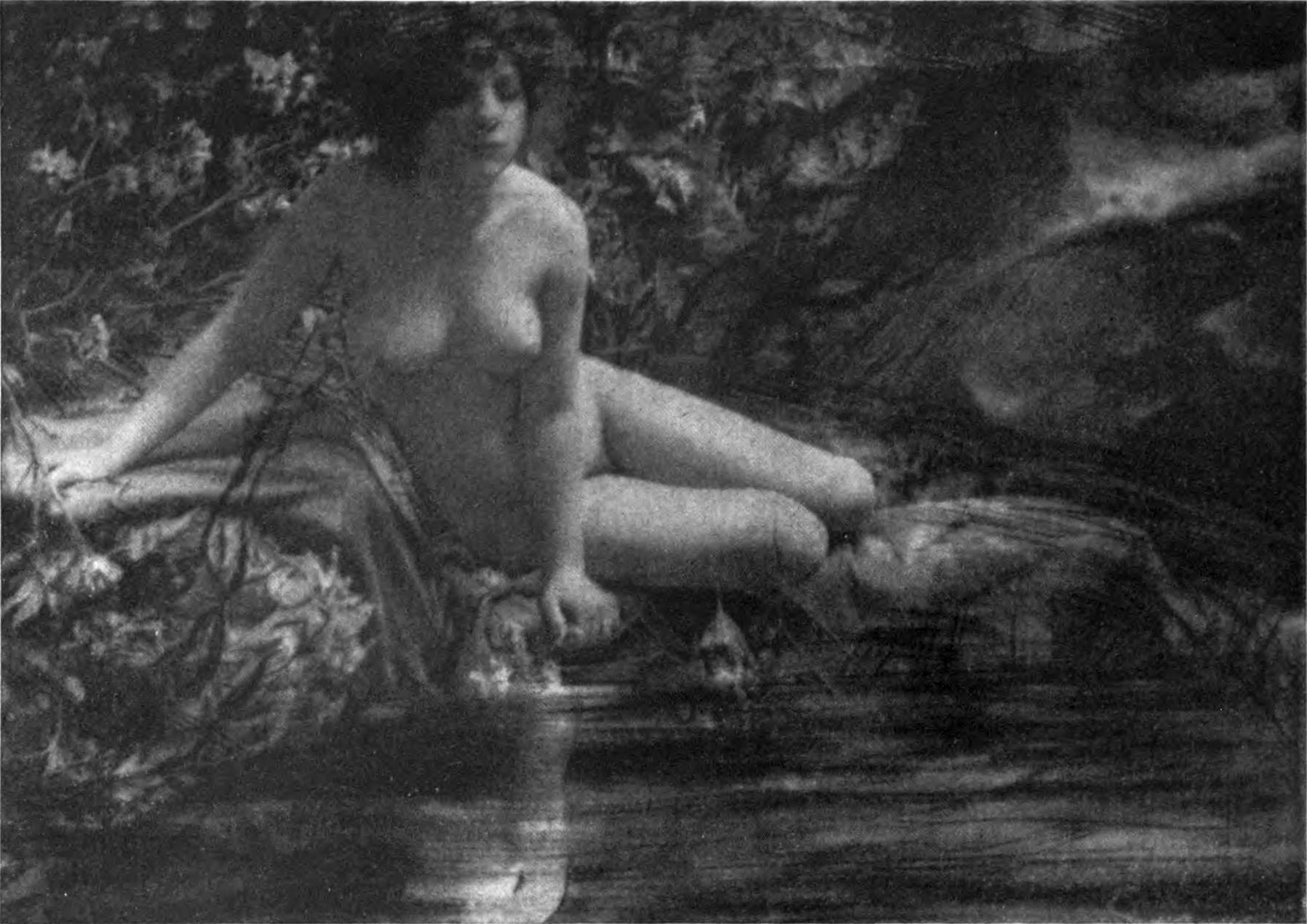 Nu au bord de l'eau